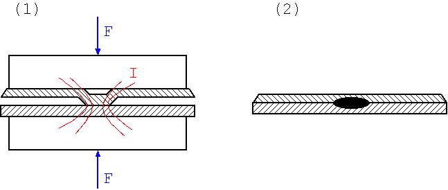 Widerstandsbuckelschweißen - Prinzipskizze (1)bei Schweißbeginn (2) nach der Schweißung Andere Versionen